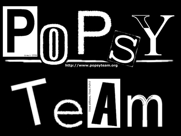 PoPsY TeAm (demogroup) logo.